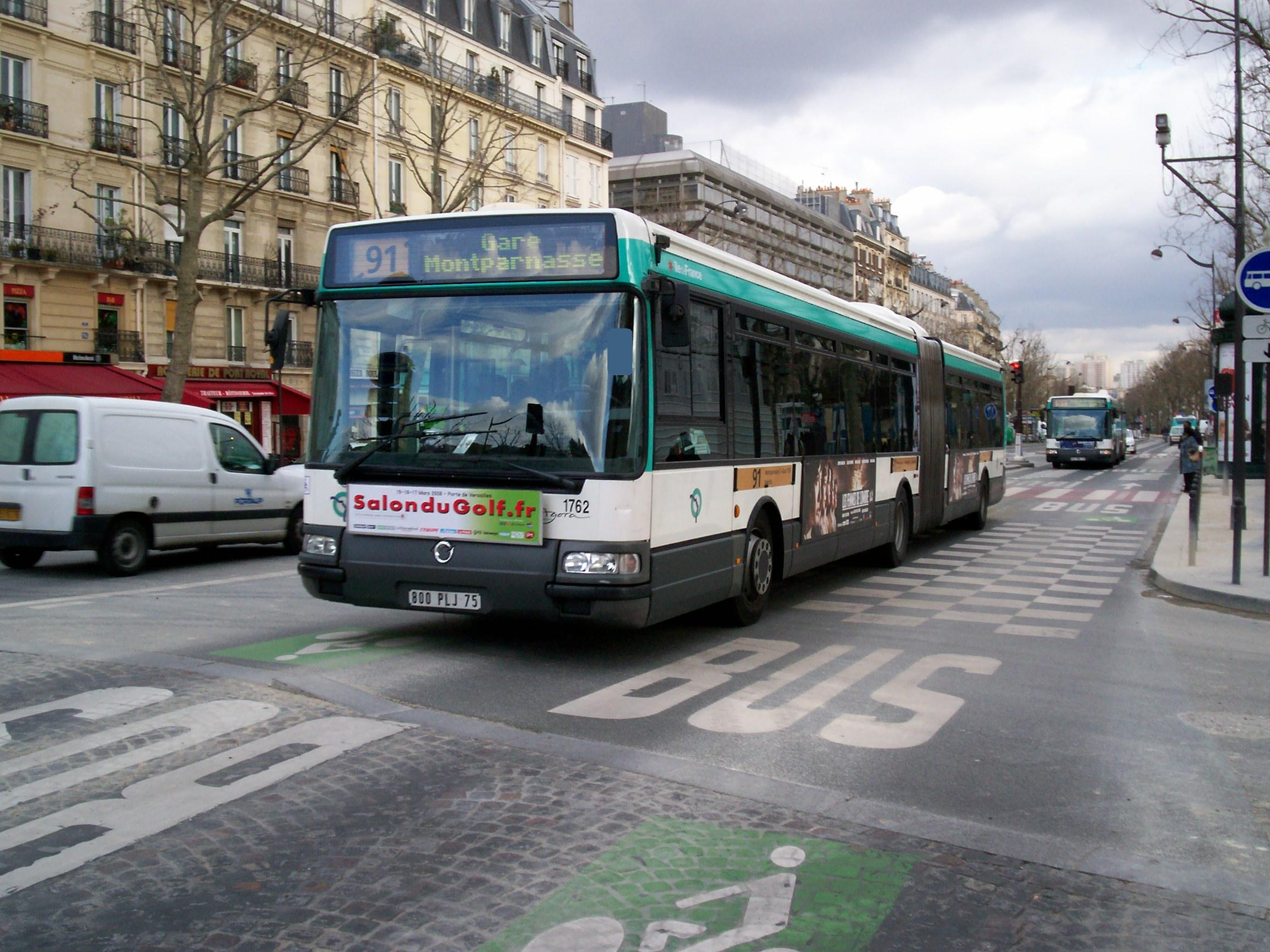 Bus Agora L à Observatoire-Port Royal en direction de Montparnasse 2 - Gare TGV